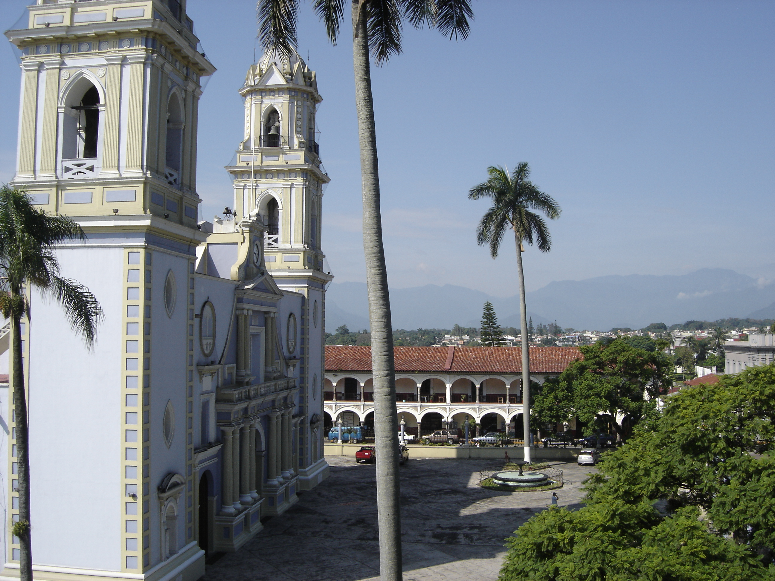 Catedral de Córdoba Veracruz